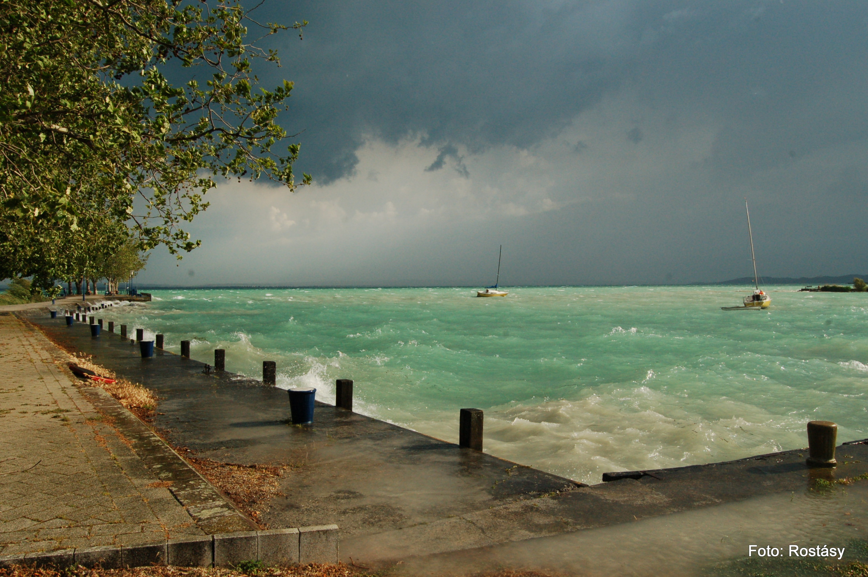 Alsóörs 2014. május 26.